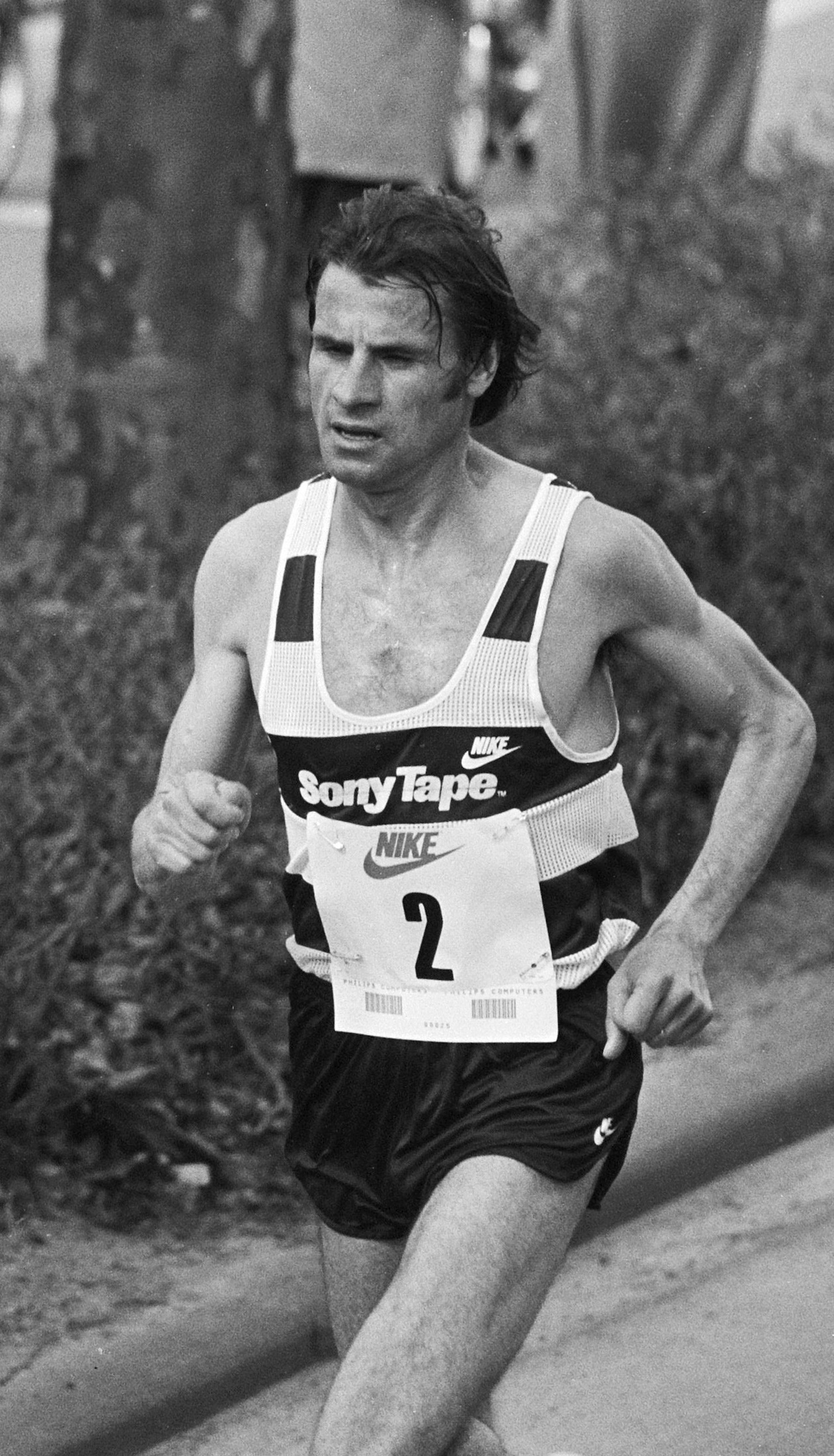 Marathon van Rotterdam; winnaar Carlos Lopes (Portugal) alleen onderweg.